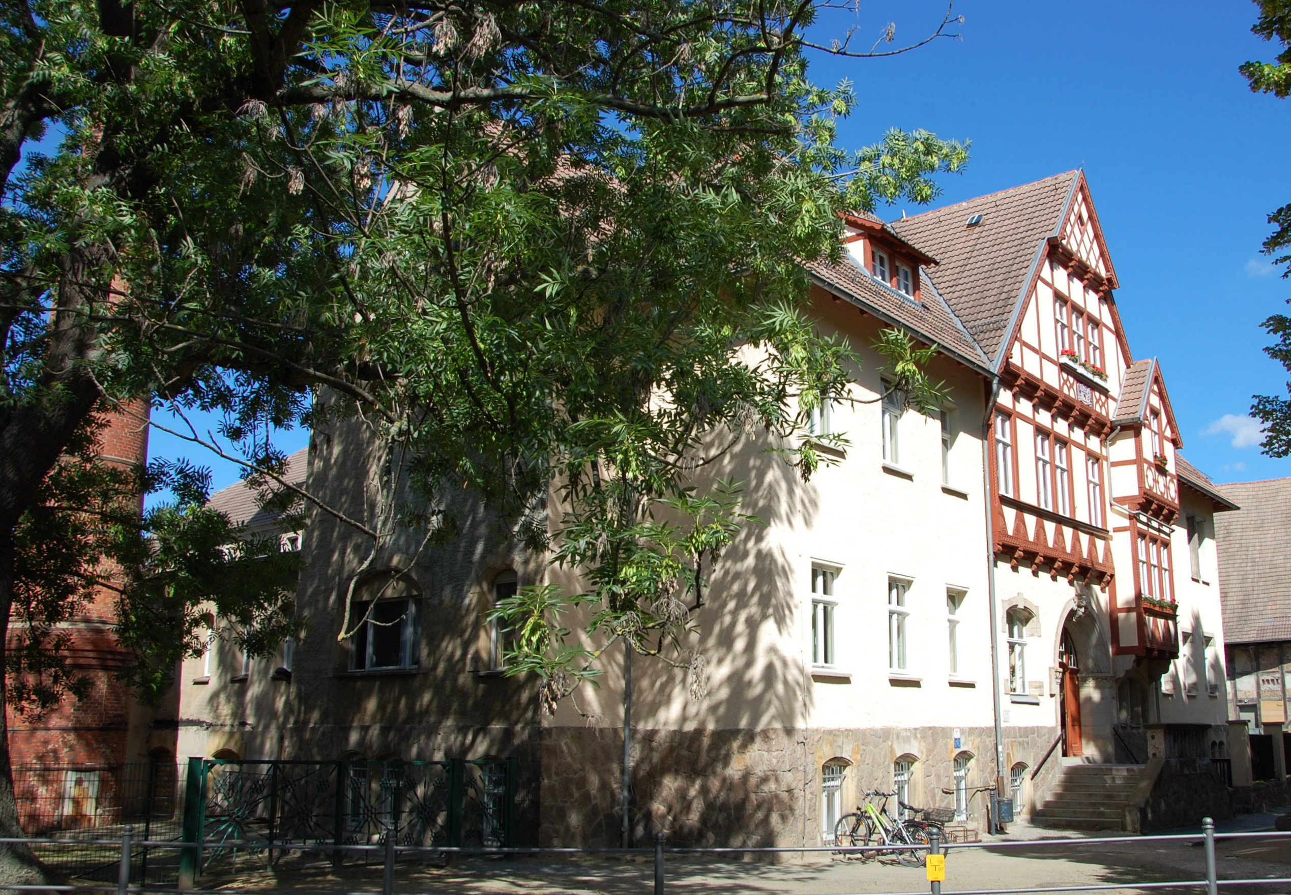 Haus GutsMuthsstraße 6 in Quedlinburg